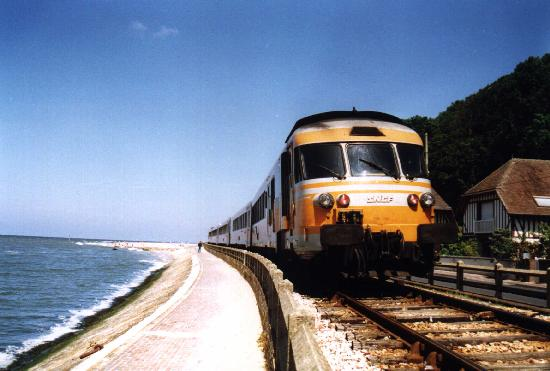 RTG à Houlgate